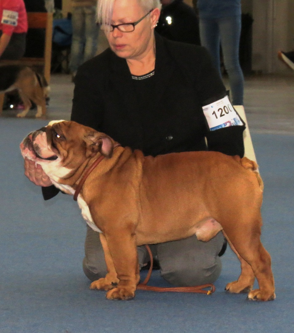 Хельсинки, на шоу Финниш-виннер 2015